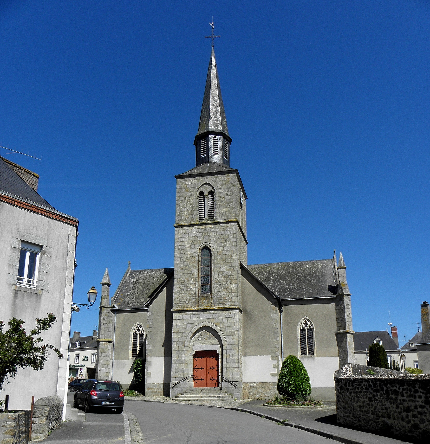 Église Saint-Georges de Martigné-sur-Mayenne (53). Façade occidentale.